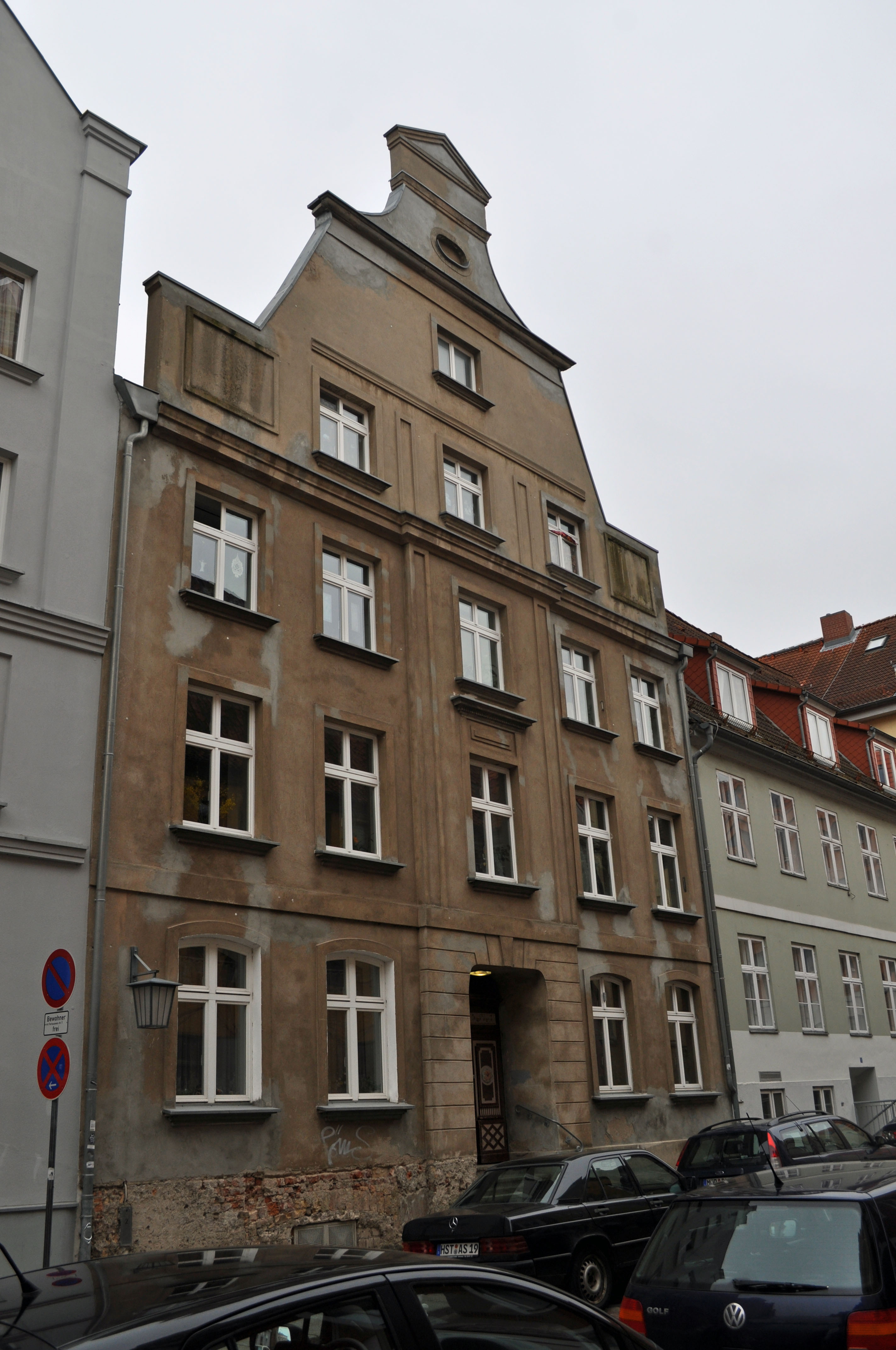 Gebäude bzw. Gebäudedetail in Stralsund. Straße und Hausnummer siehe Dateiname.